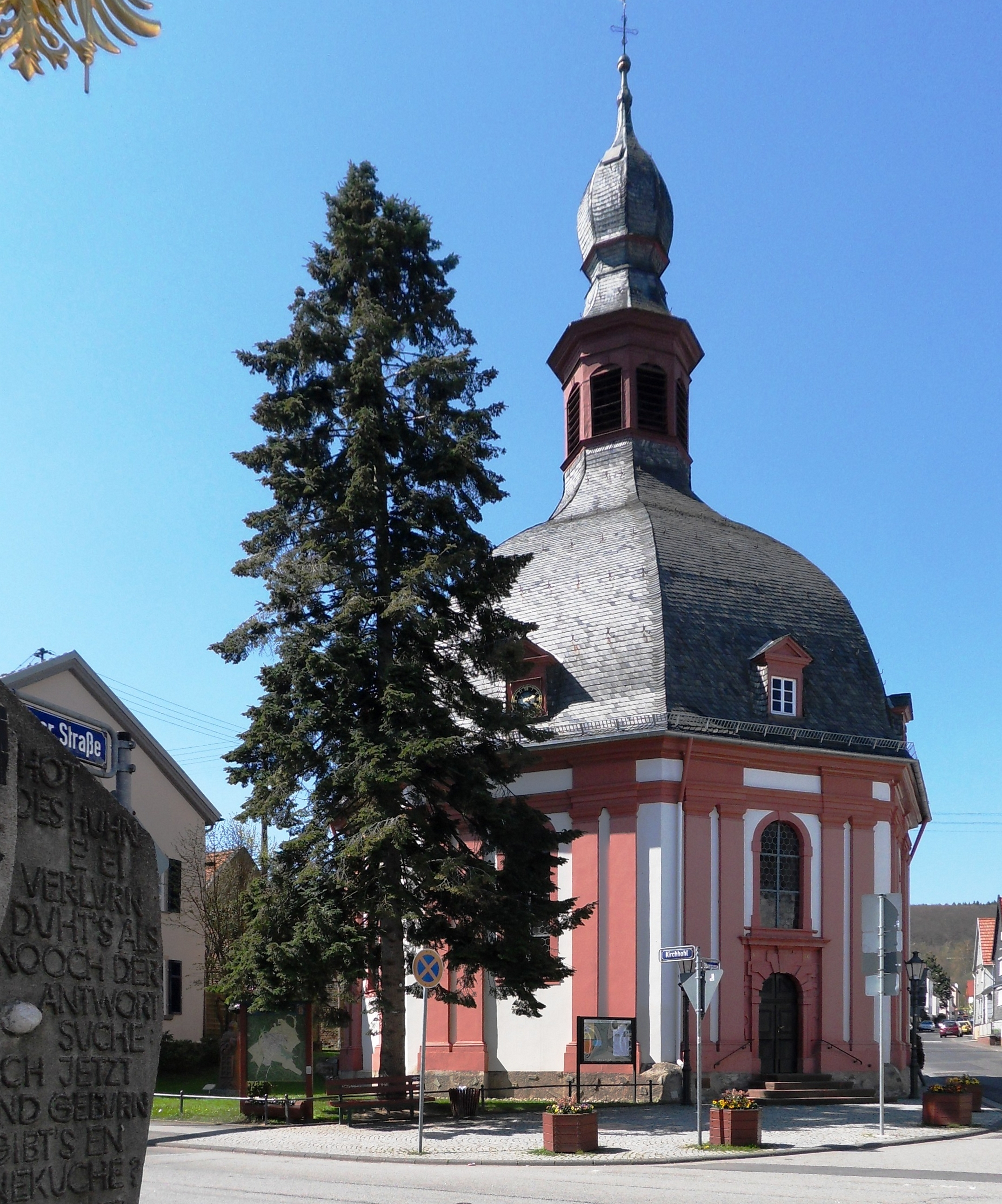 Evangelische Kirche in Wiesbaden-Naurod, Blick von Südosten